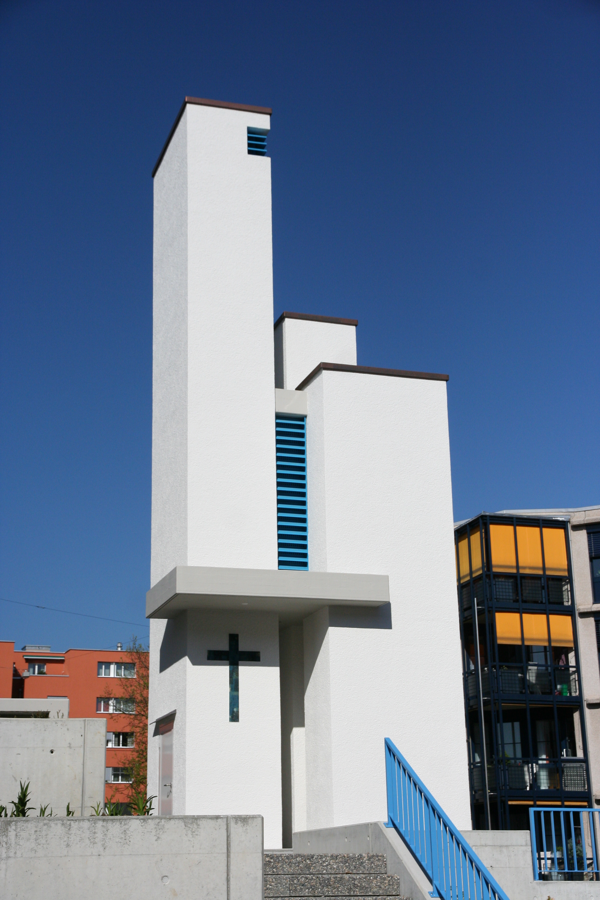 Römisch-katholische Pfarrkirche St. Urban Winterthur-Seen